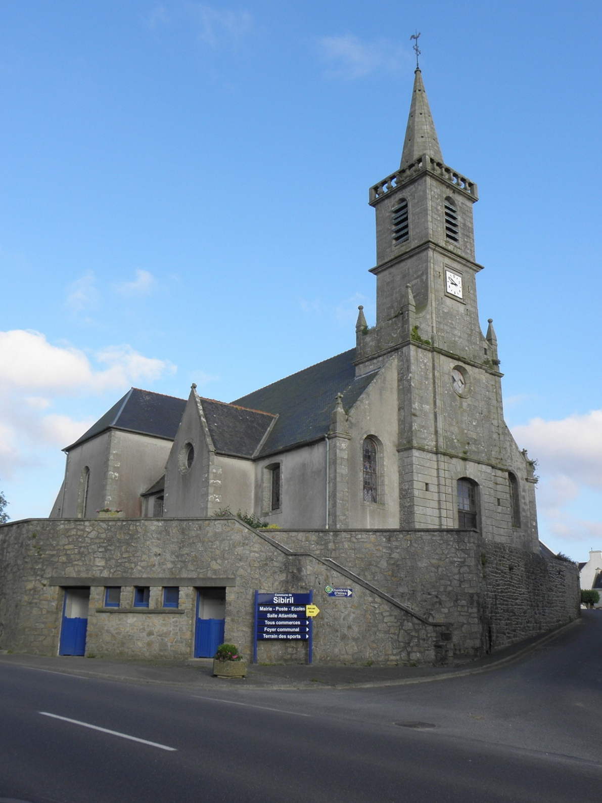 Façade occidentale et flanc nord de l'église paroissiale de Sibiril (29).